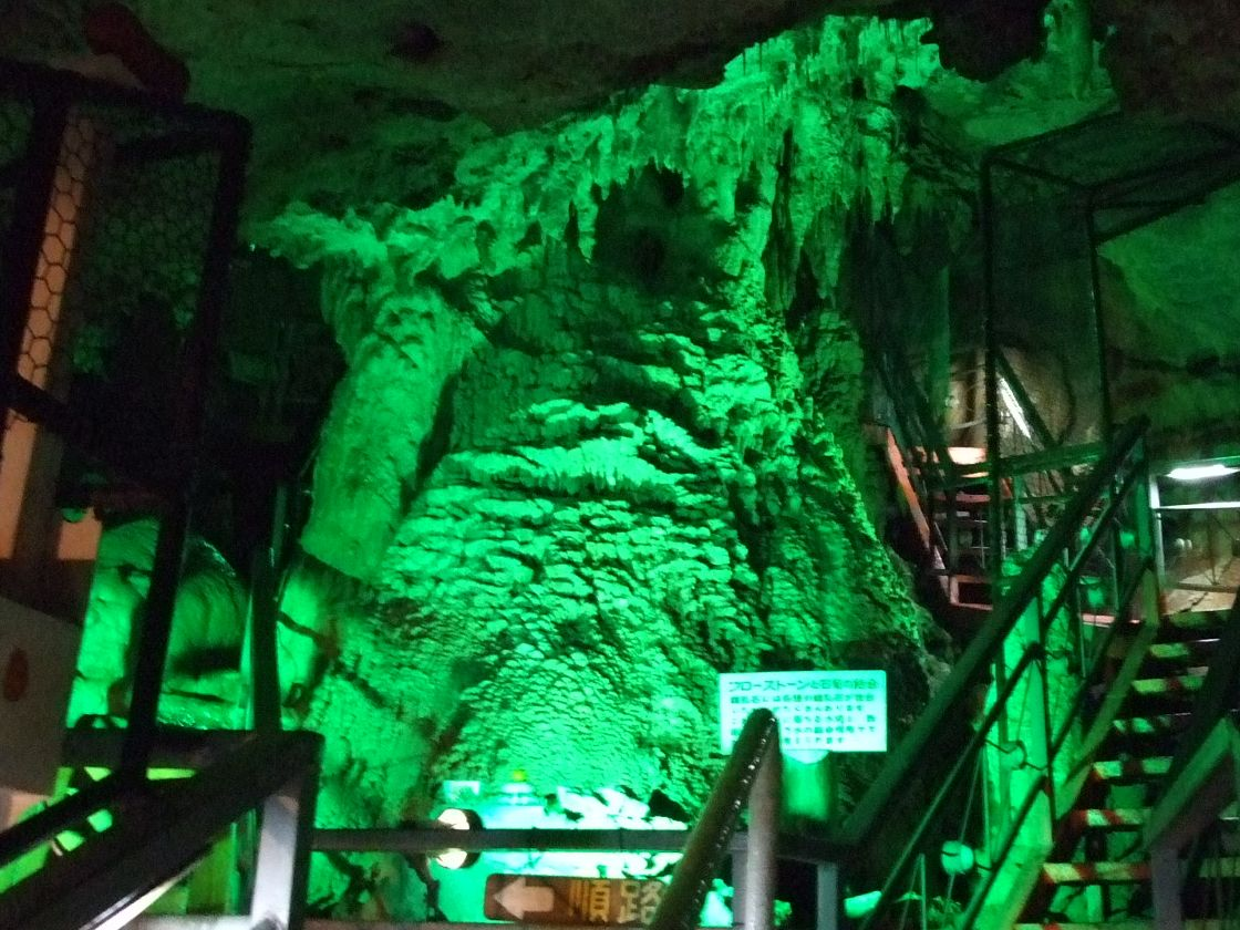 Kyusendo 球泉洞